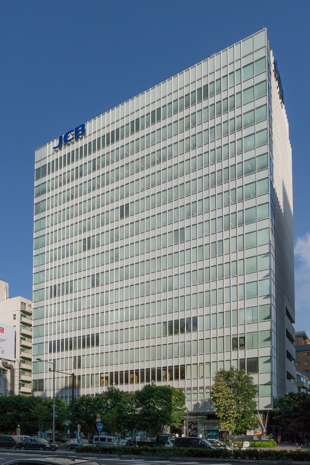 青山ライズスクエア、東京都港区南青山5丁目。